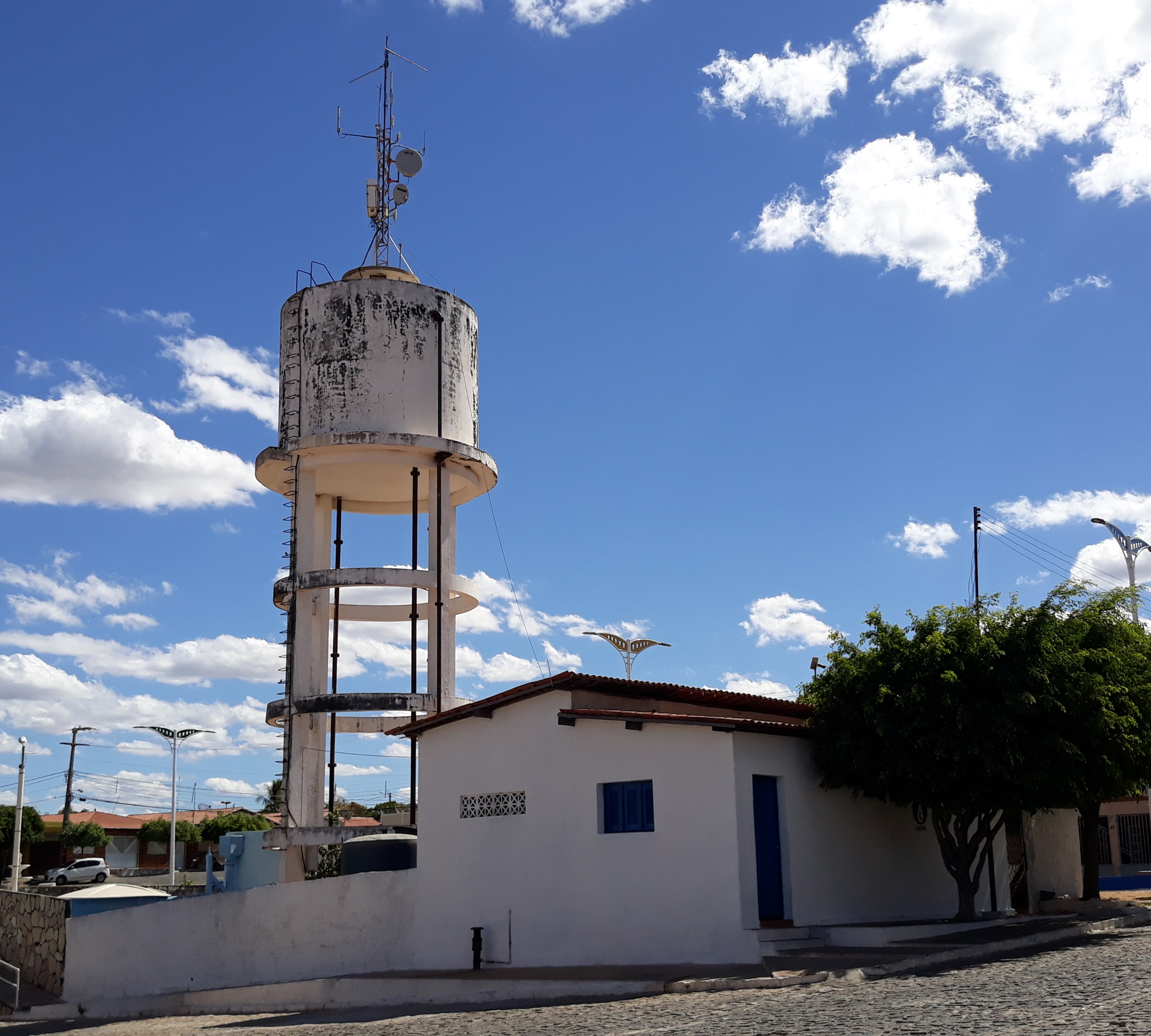 Escritório local e caixa d'água da Companhia de Águas e Esgotos do Rio Grande do Norte (CAERN) em Pilões (Brasil)